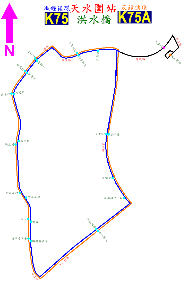 中文（香港）: 港鐵巴士K75線及K75A線的走線圖，當中藍線表示K75的走線，反時鐘方向行駛；而橙線則表示K75A線的走線，順時鐘方向行駛